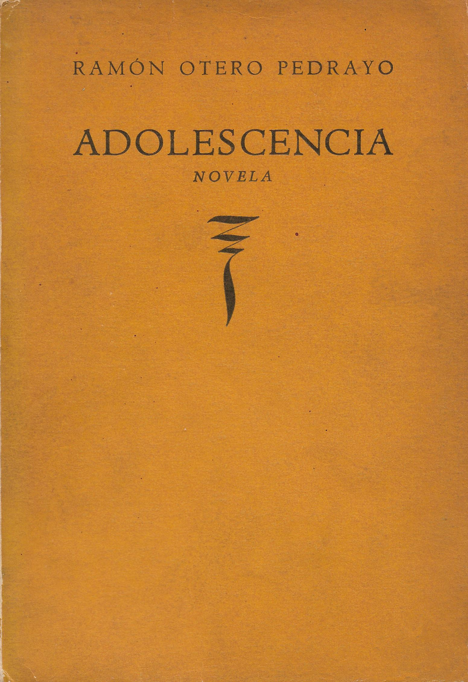 Portada da novela 'Adolescencia' de Ramón Otero Pedrayo (1944)